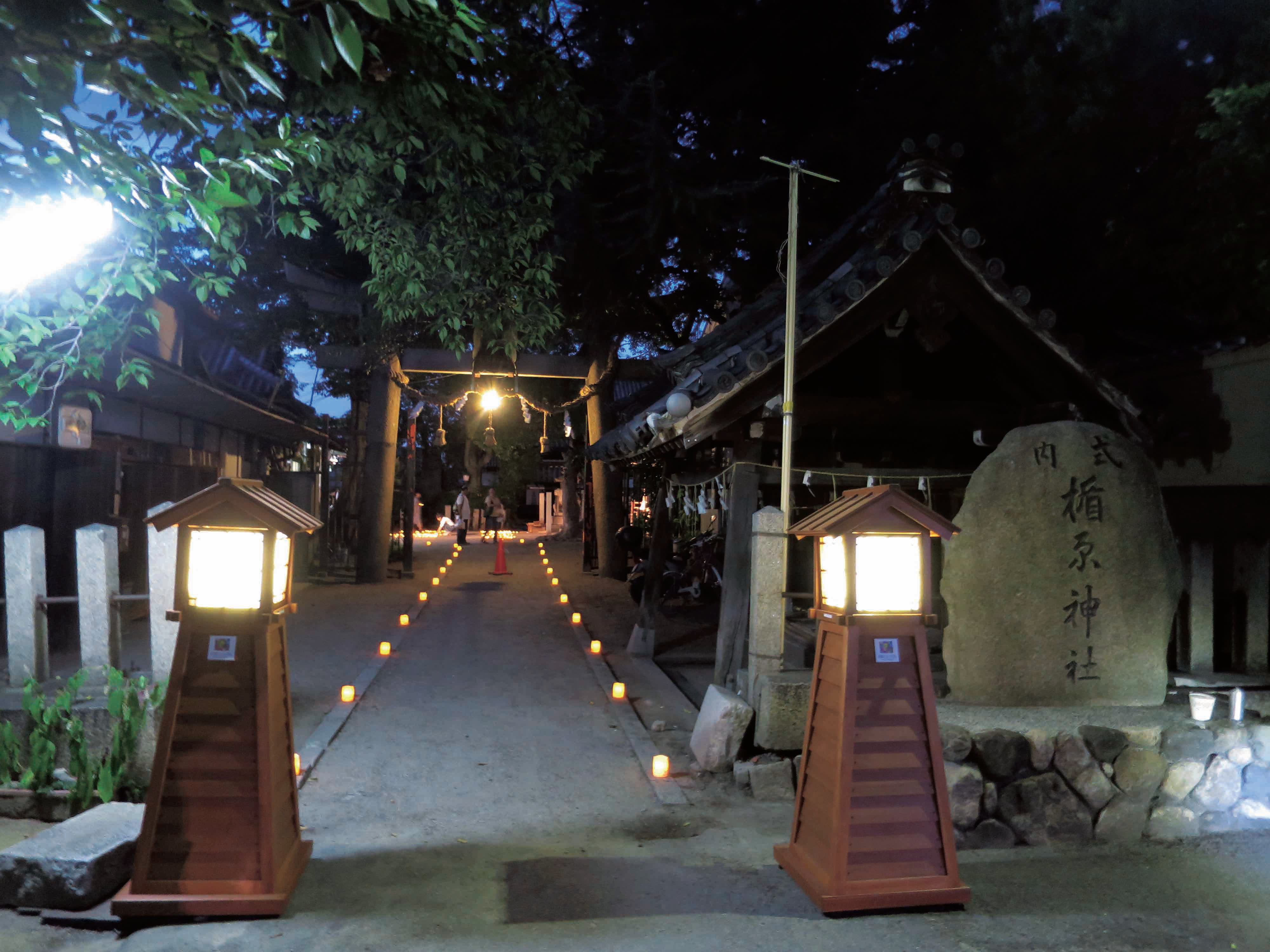 式内楯原神社（喜連灯火の夕べ）